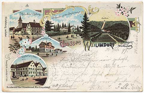 Aansichtskarte aus Weilimdorf